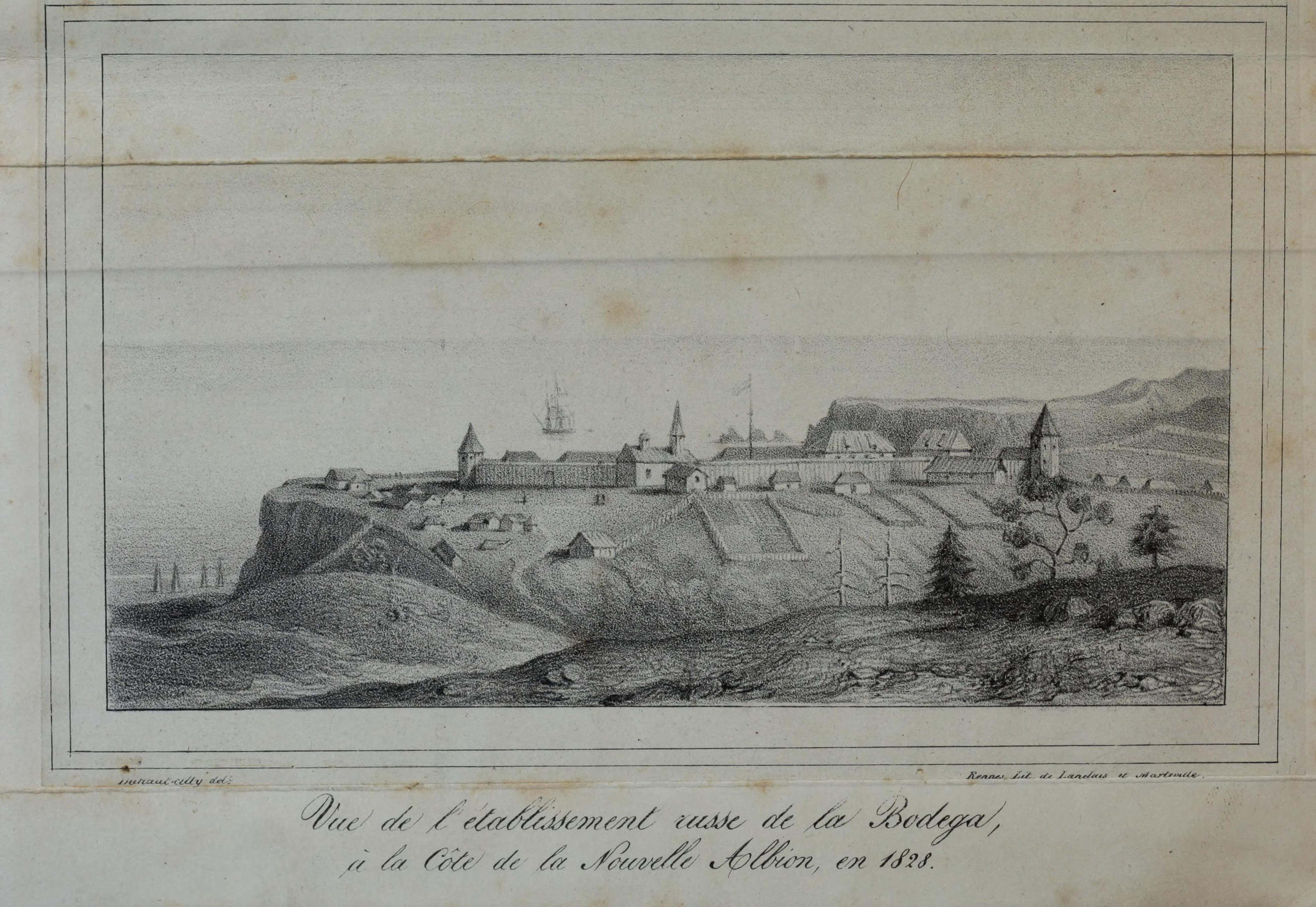 Vue de l’etablissement russe de la Bodega, à la Côte de la Nouvelle Albion, en 1828